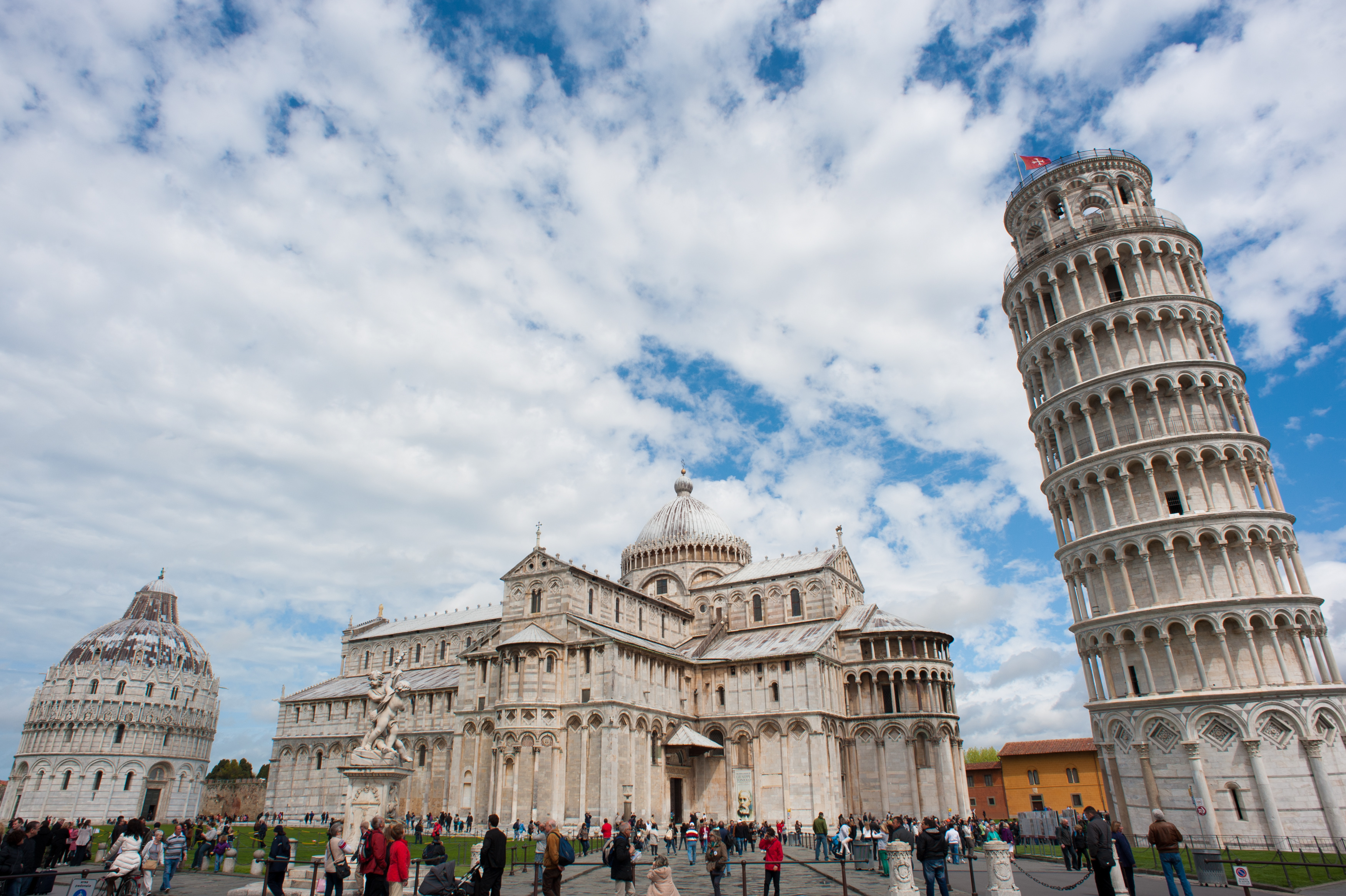 Panoramic view of Piazza dei Miracoli ("Square of Miracles"). Pisa, Tuscany, Central Italy.